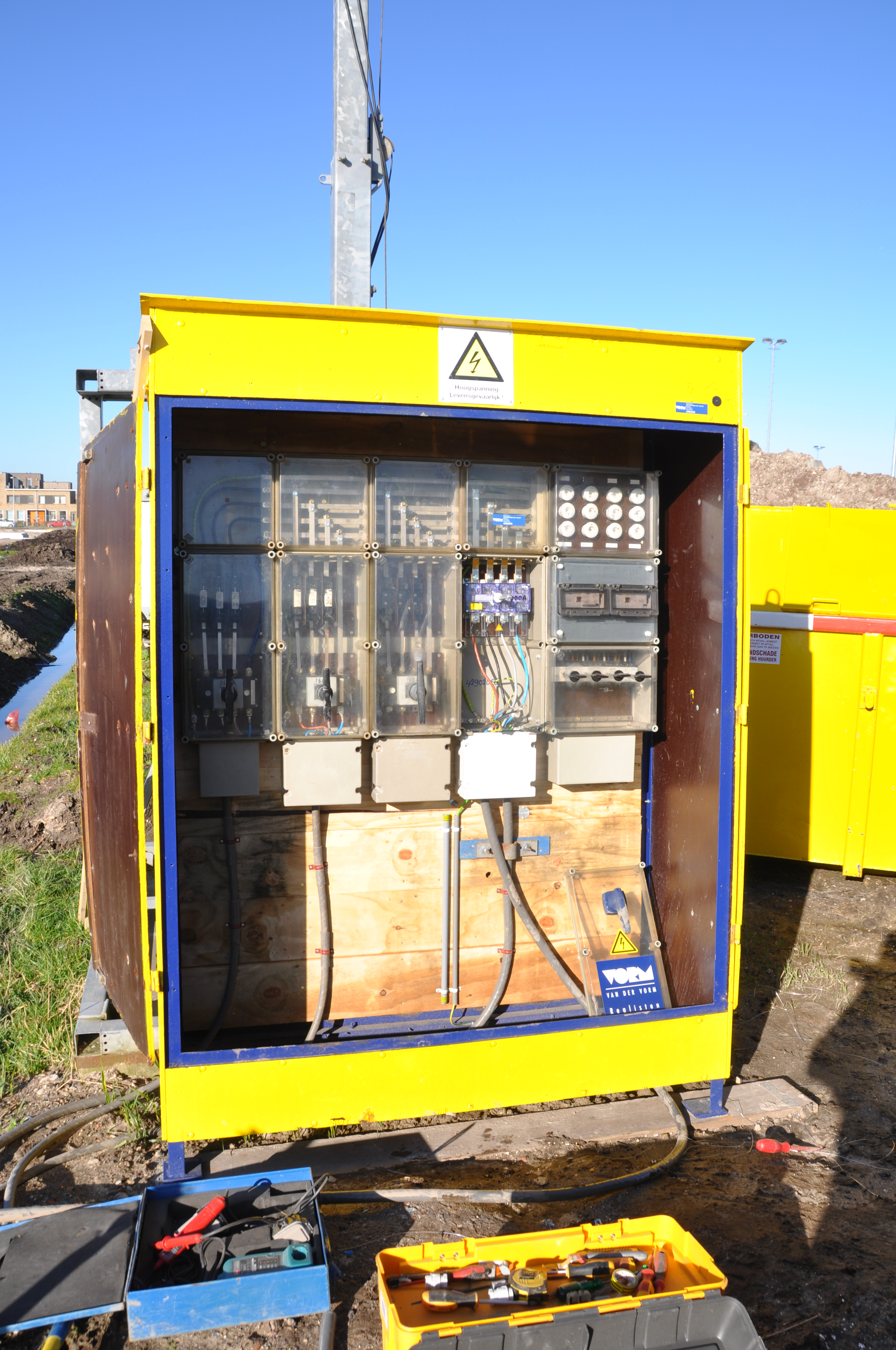 De Oosterscheldestraat (Berkel en Rodenrijs) status 3 februari 2014..